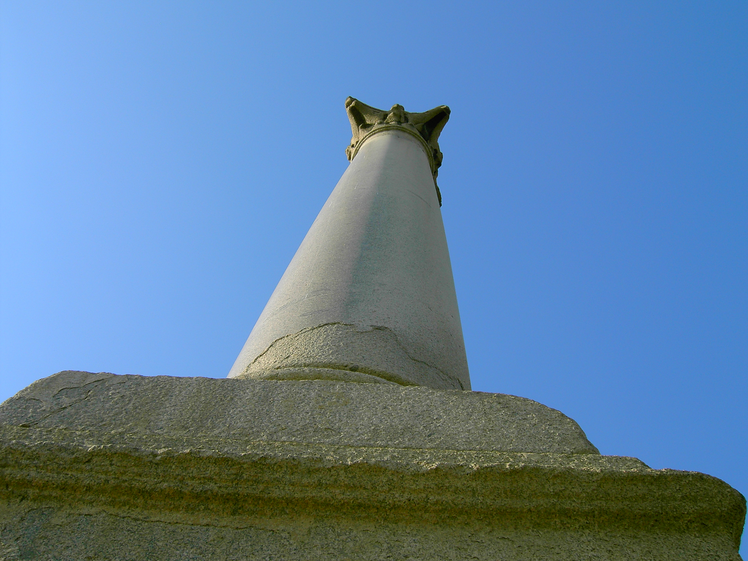 Pompey's Pillar. Photo personnelle d'Alexandrie